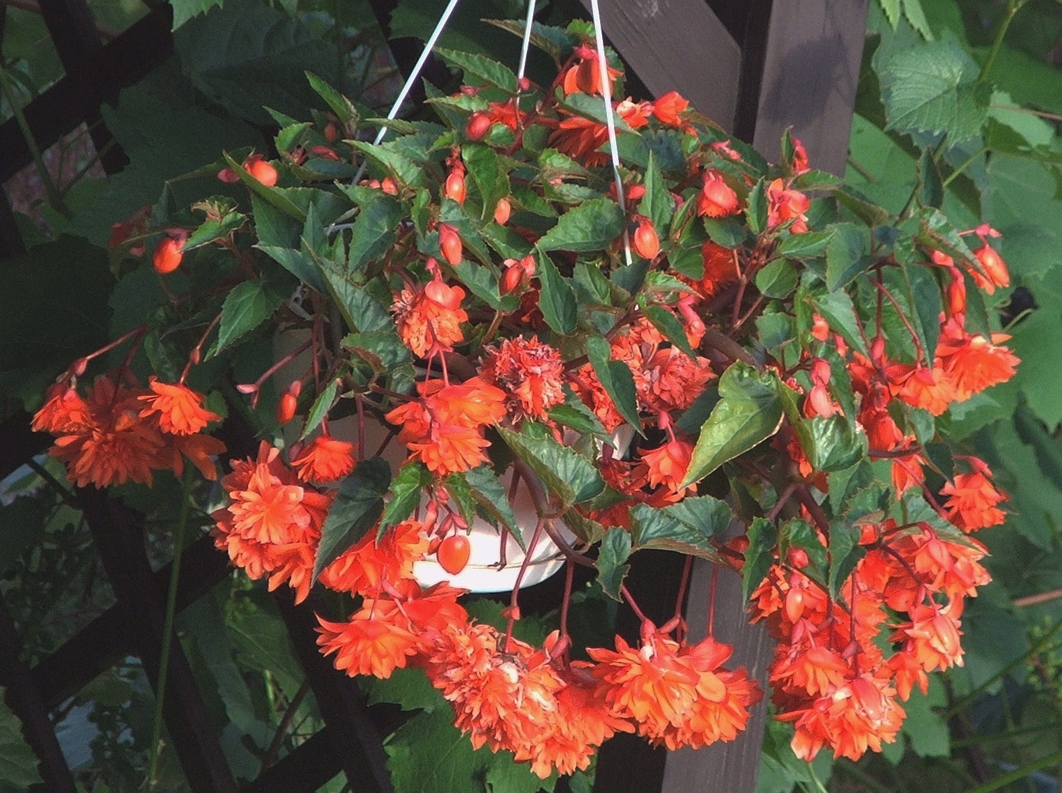 Begonia × tuberhybrida (pl. mieszaniec z grupy `Pendula` begonii bulwiastej)